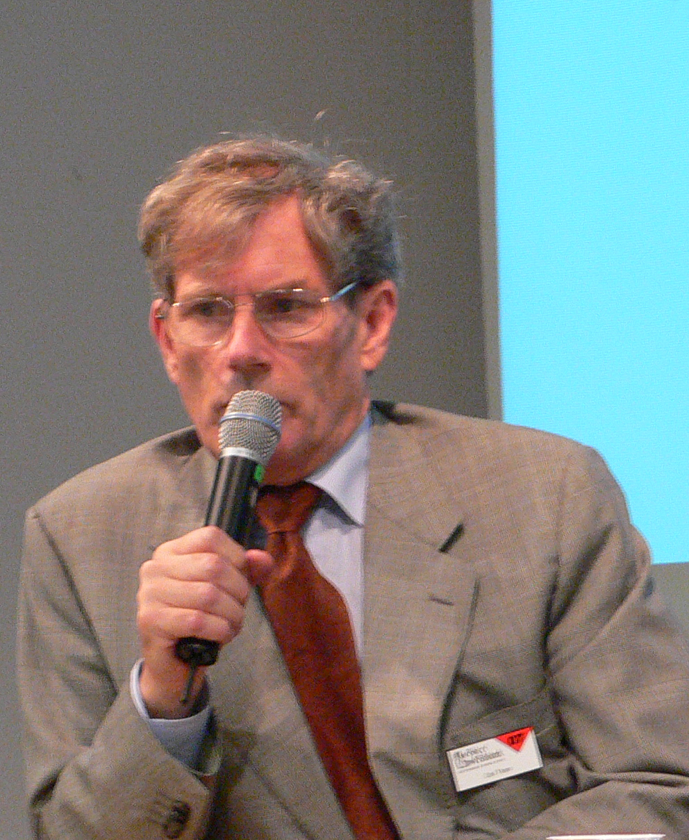 Carl Tham at Gothenburg Book Fair 2007, Carl Tham på Bok- och biblioteksmässan 2007